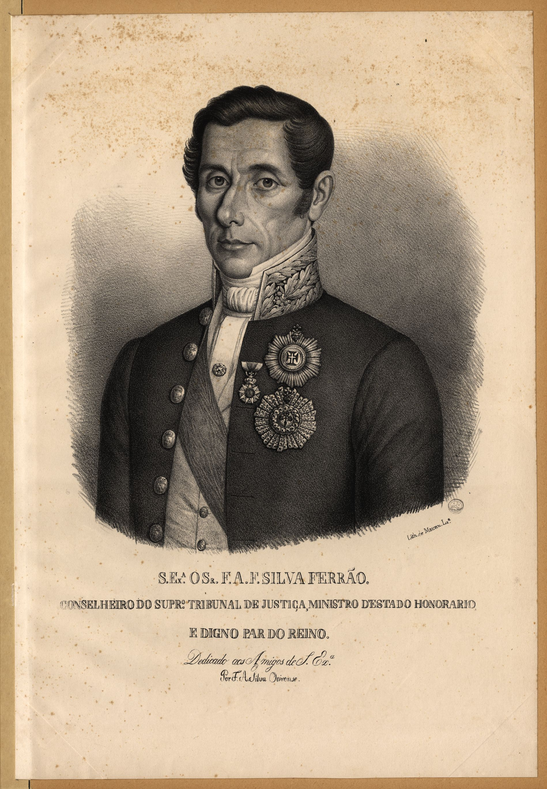 SILVA OEIRENSE, Francisco António da, 1797?-1870? S. Ex.ª O Sr. F. A. F. Silva Ferrão, Conselheiro do Supr.º Tribunal de Justiça... [Visual gráfico / por F. A. Silva Oeirense. - [S.l. : s.n. ca. 1840] (Lxª : Lith. de Maurin. - 1 gravura : litografia, p&b